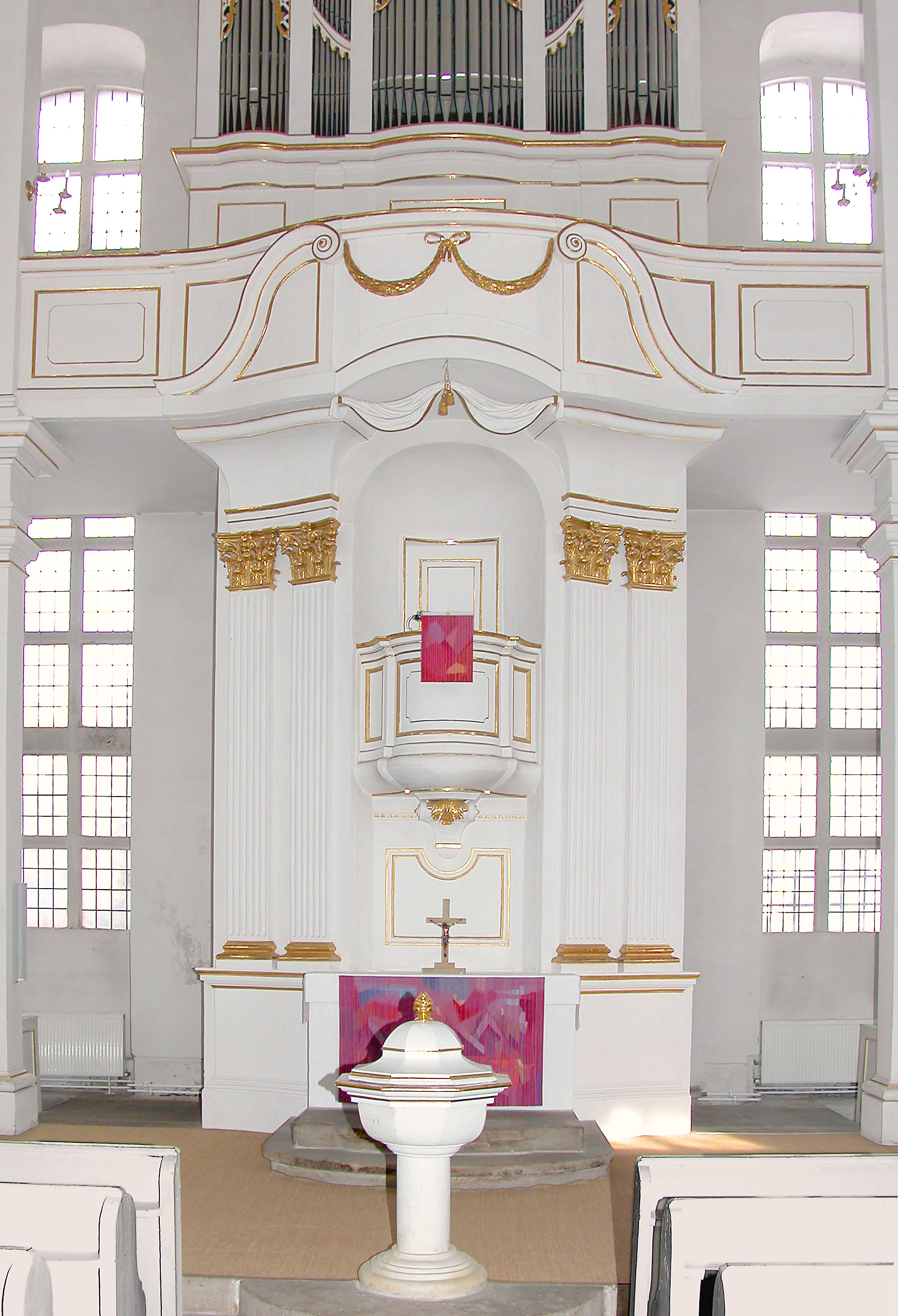 01.04.2001 01847 Lohmen, Dorfstraße (GMP: 50.989566,13.995545): Kirche, Barockbau von 1786-1789 von J. D. Kayser. [DSCN8806.TIF]20060305130DR.JPG(c)Blobelt